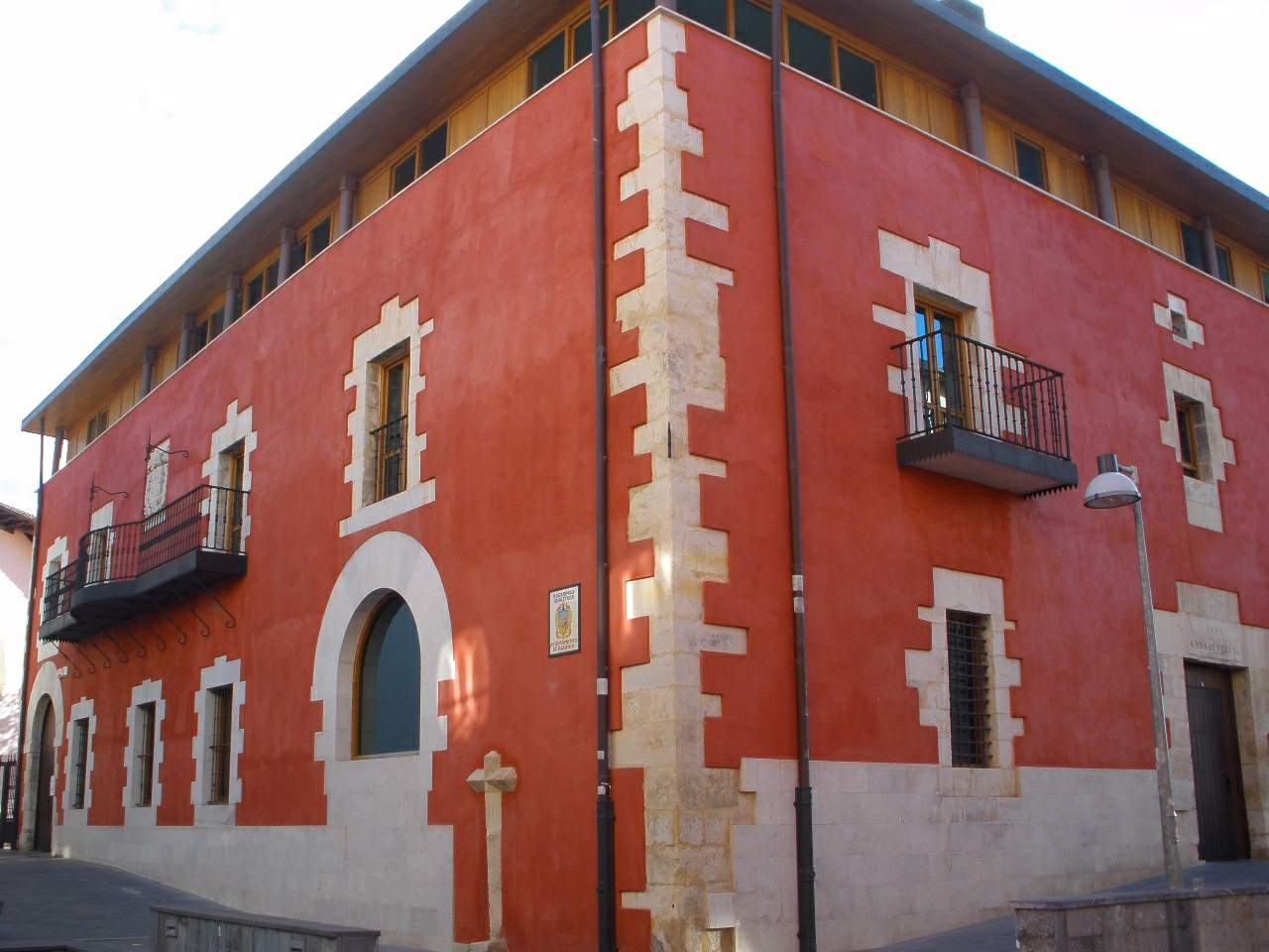 Ayuntamiento y antigua iglesia de San Martín, en Salvatierra-Agurain (Álava)